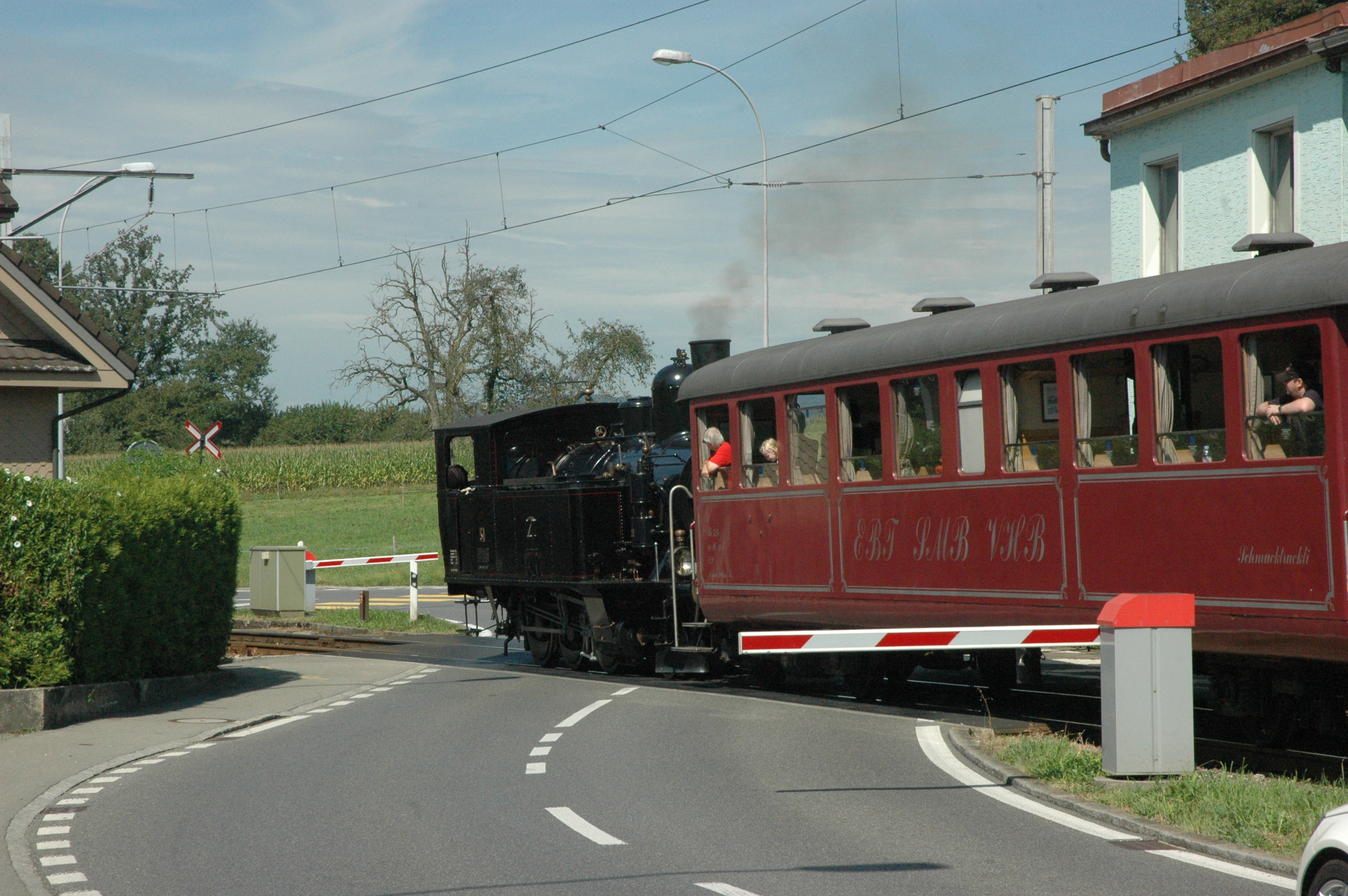 Dampflokomotive Ed 3/4 Nr. 51 (ex BSB) des Vereins Dampfbahn Bern (VDBB) mit Personenzug in Ballwil (Seetal, Schweiz)